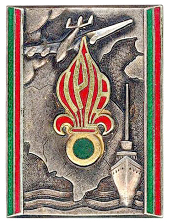 Insigne de la compagnie de passage de la Légion étranère en Indochine (CPLE)